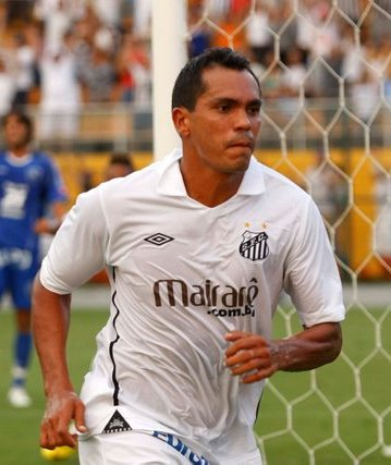 Comemoração gol Giovanni - 2010